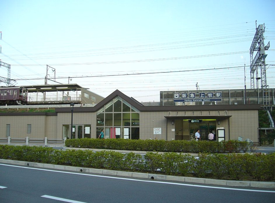 阪急京都本線上牧駅